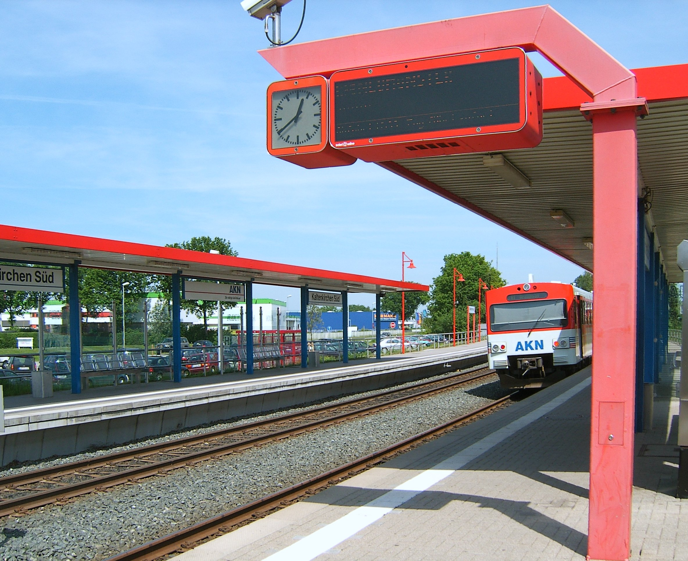 Bildbeschreibung: Kaltenkirchen, Bf. Kaltenkirchen Süd mit in Richtung Kaltenkirchen ausfahrendem VTA. Fotograf: selbst Datum: 9.6.2006